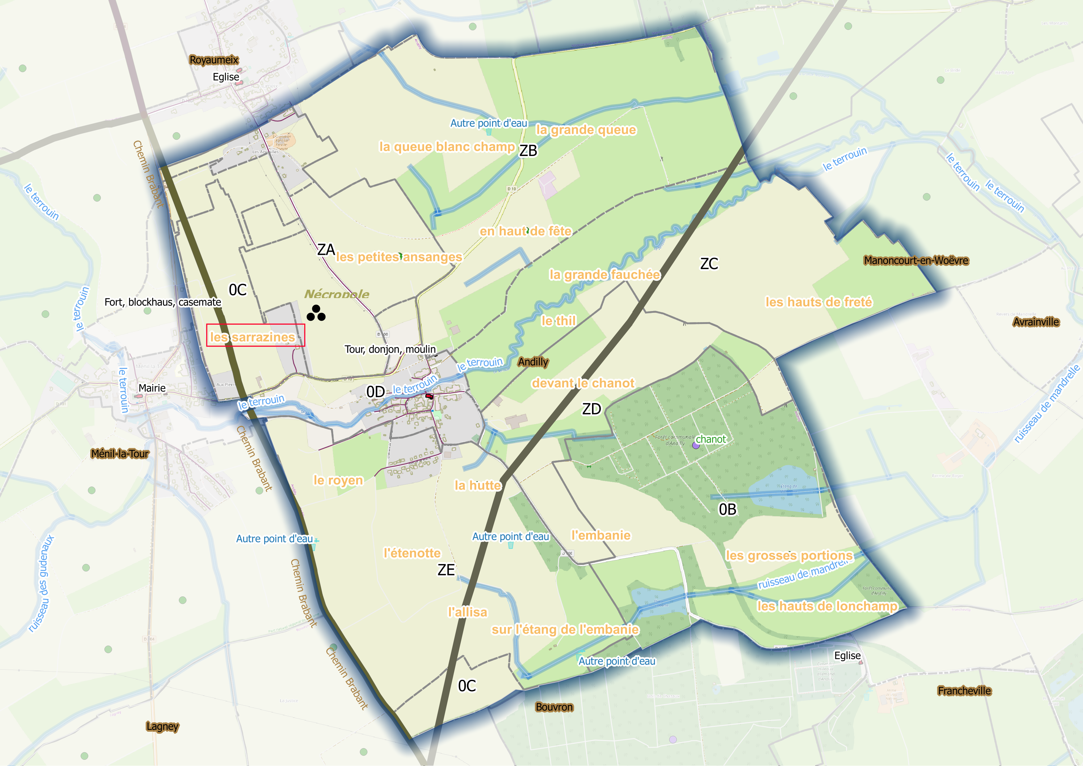 Fig1 - Andilly - (Ban communal)